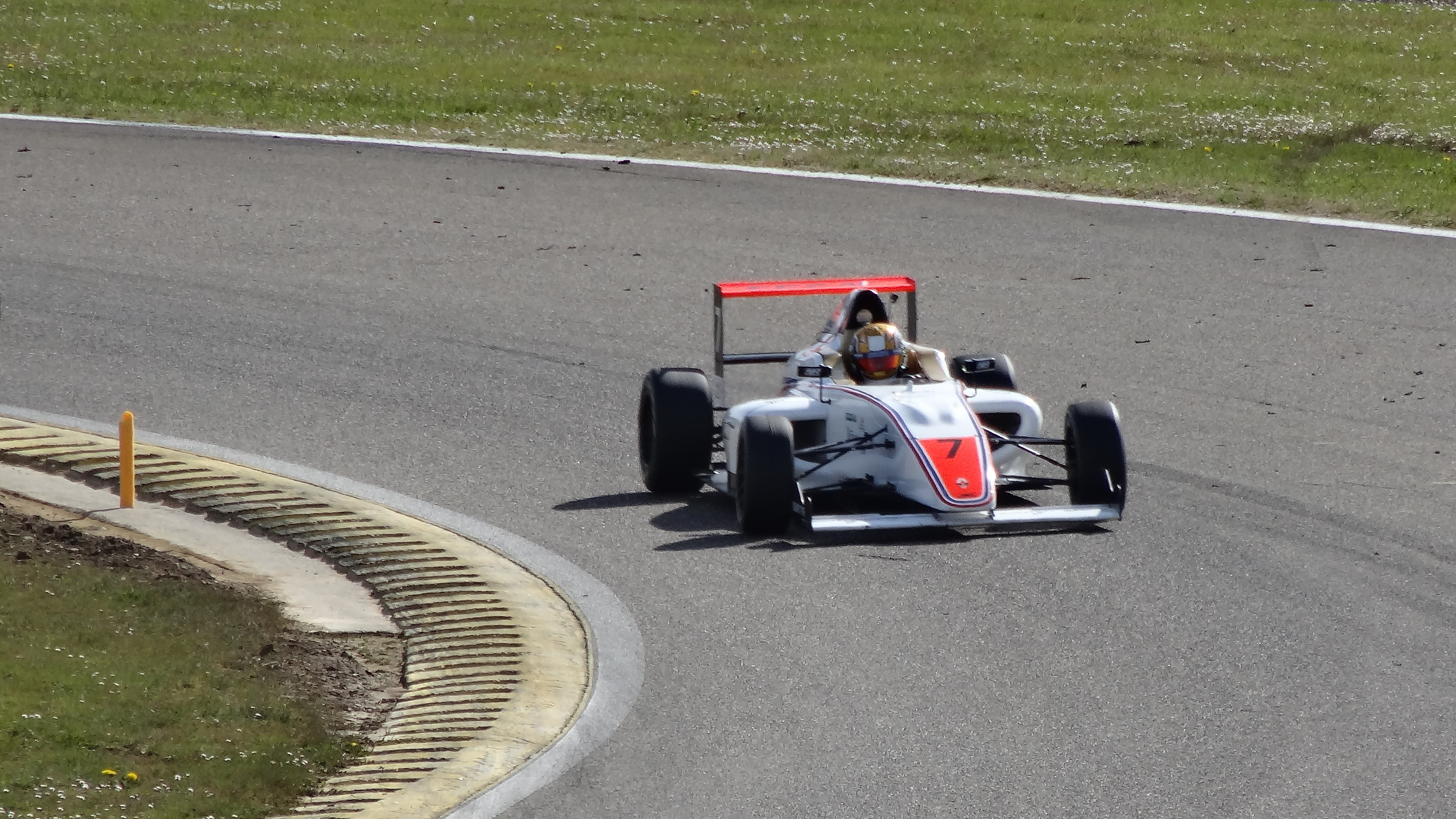 51e Coupes de Pâques (sport automobile), sur le Circuit Paul Armagnac à Nogaro (Gers) : F4 France.